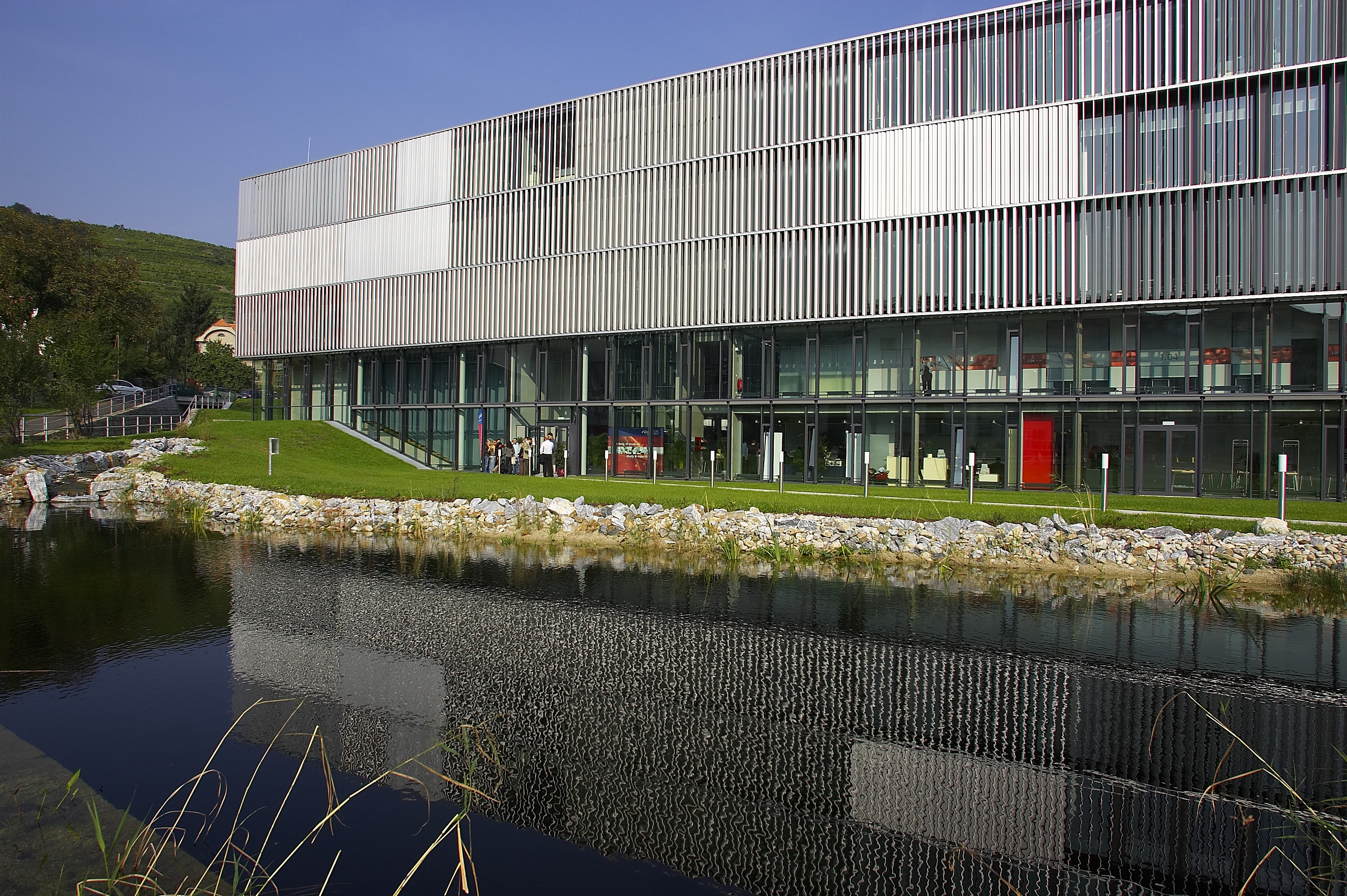 IMC FH Krems Gebäude Trakt G.jpeg